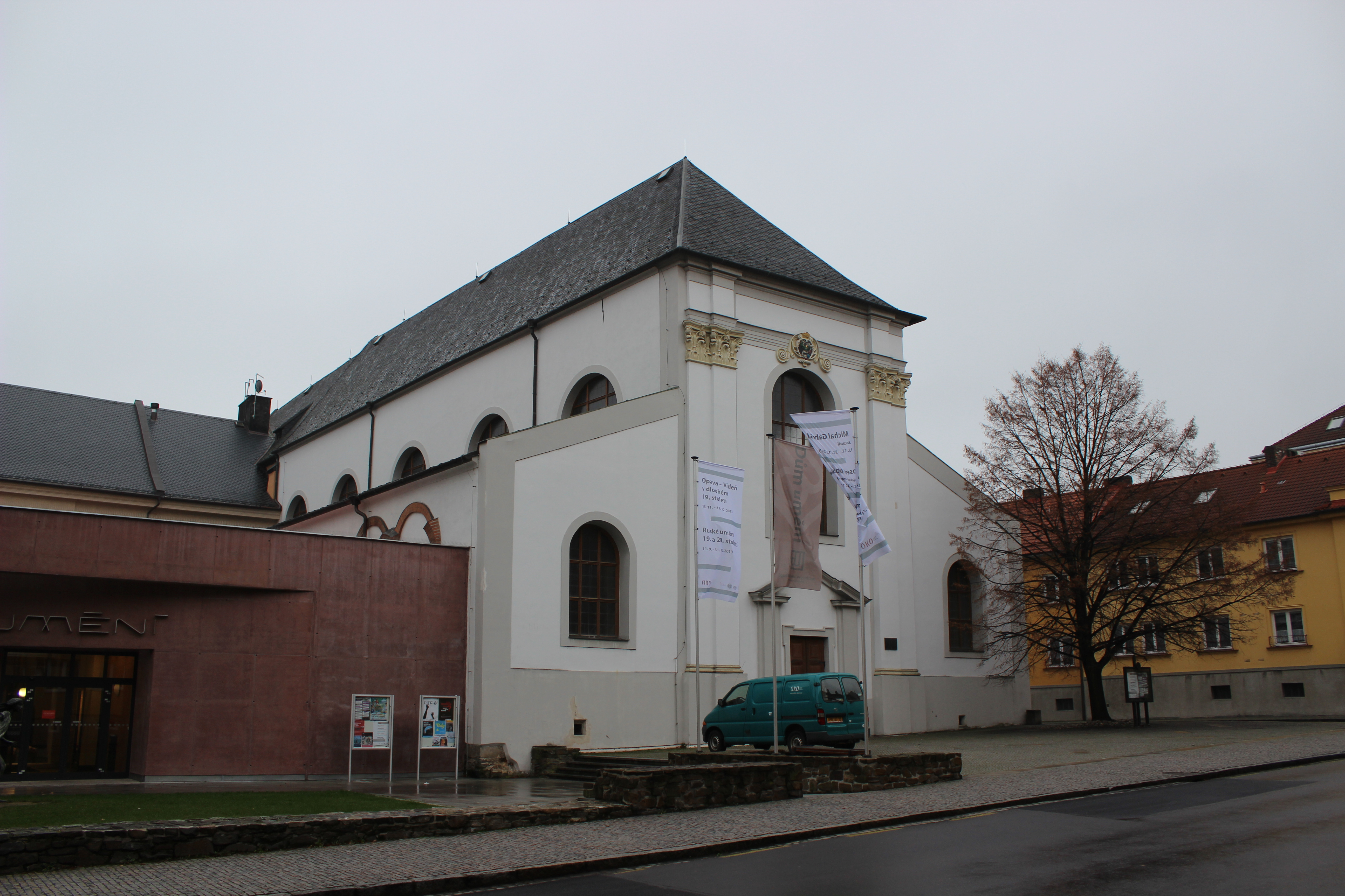 Kostel svatého Václava z opavské Pekařské ulice.